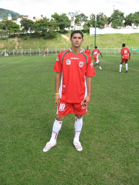 Robinson Castro